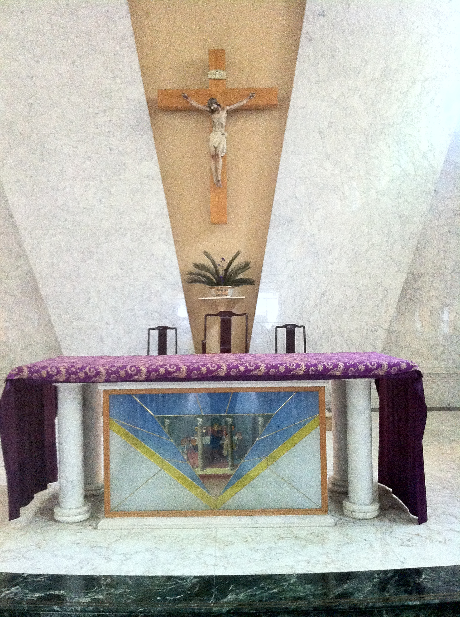 中文（香港）: 聖十字架堂祭台, 香港, 中國